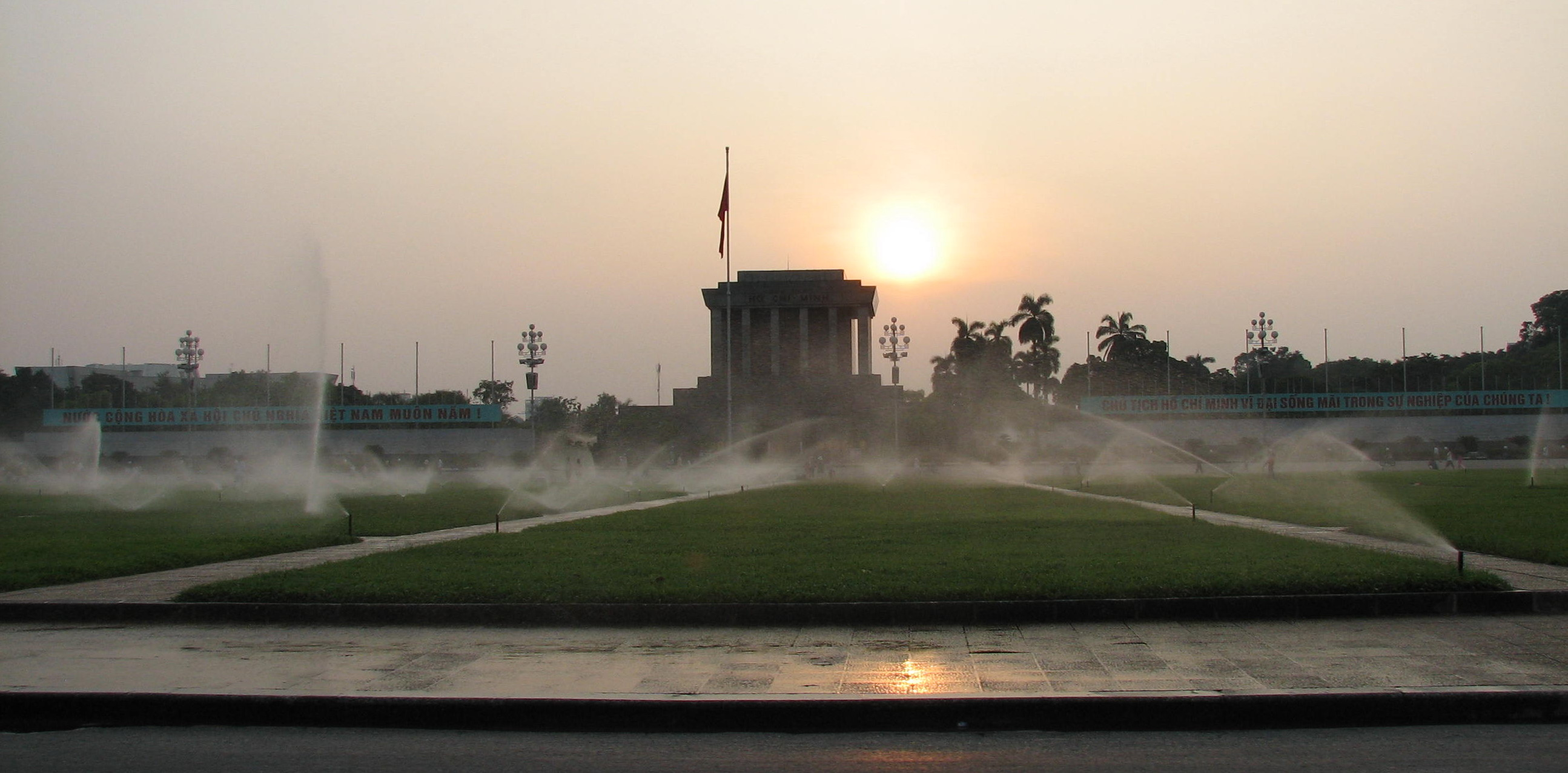 Ba Đình Square, Hanoi, Vietnam